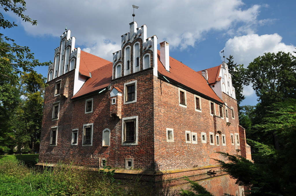 Gotycki zamek „na wodzie” w Wojnowicach, 1513-62, elewacje: pd i zach. Gmina Miękinia, powiat Środa Śląska.